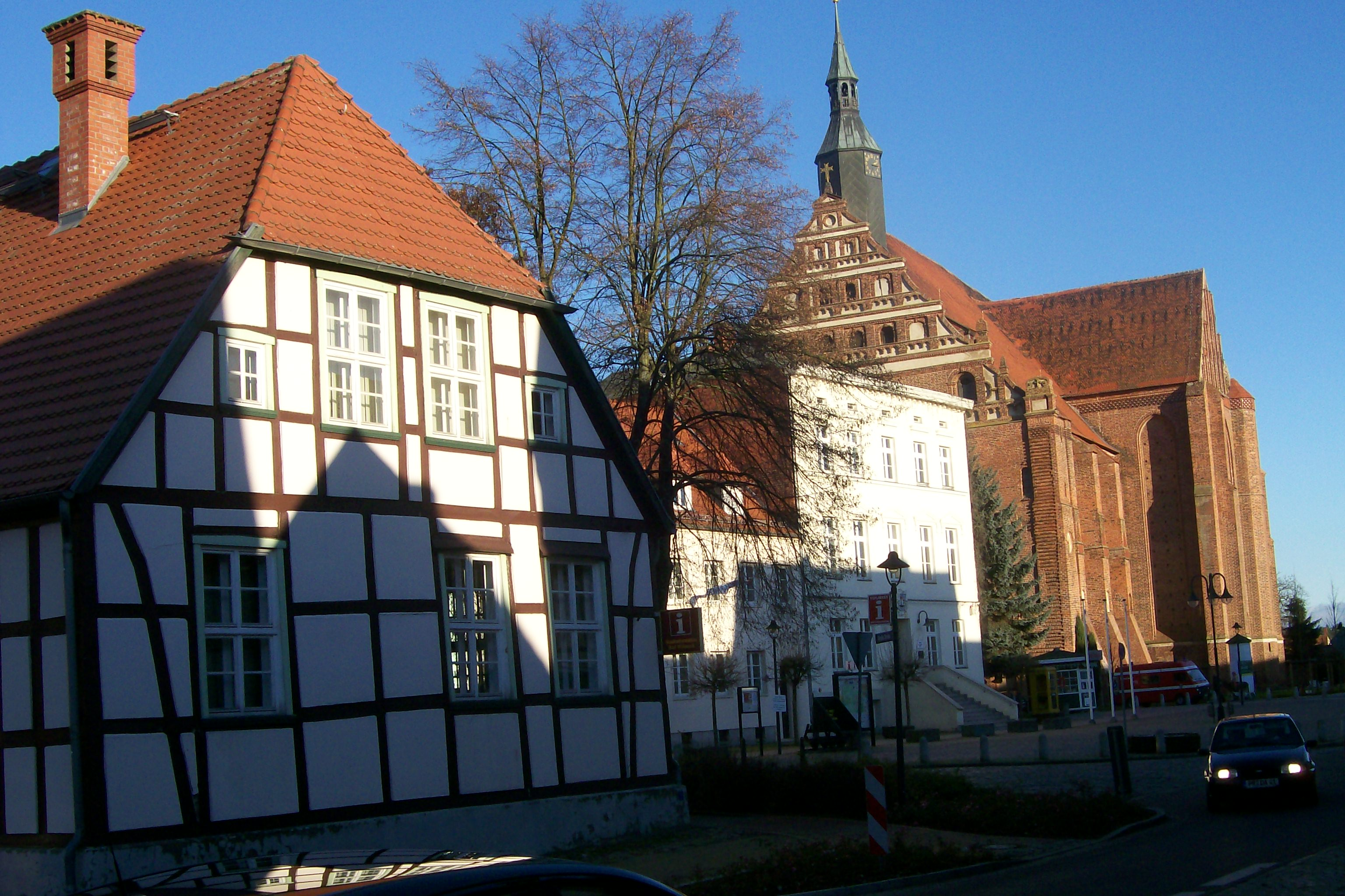 Zwei ehemalige Rathäuser in Bad Wilsnack:Links das "Alte Rauhaus" aus dem 18. Jahrhundert; in der Mitte das "Neue Rathaus" von 1865, jetzt Sitz des Amtes Bad Wilsnack; rechts die Wunderblutkirche (Bad Wilsnack)